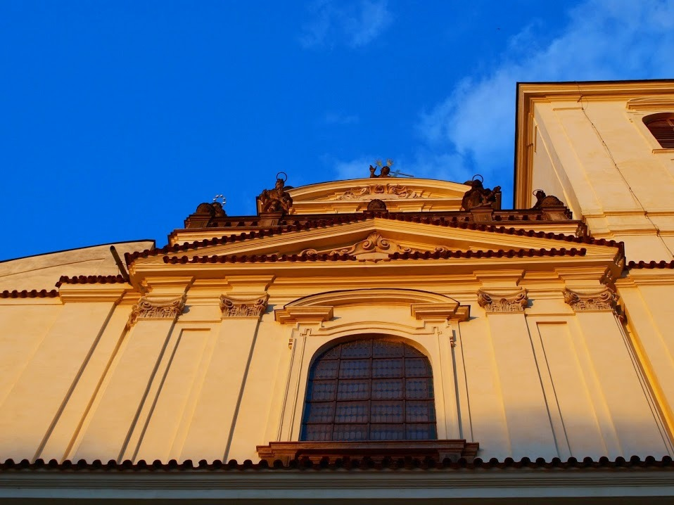 Praha, kostel sv. Jakuba Většího